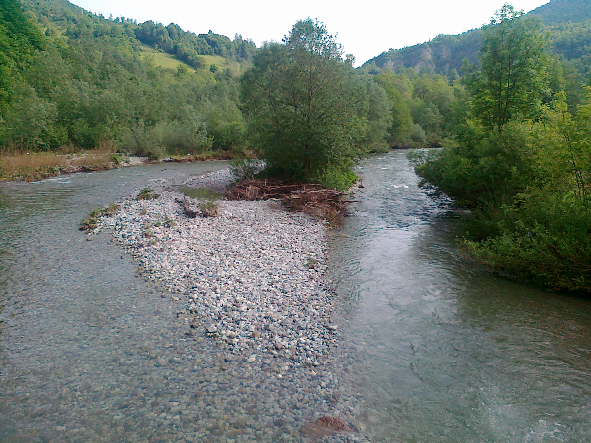 Rzav